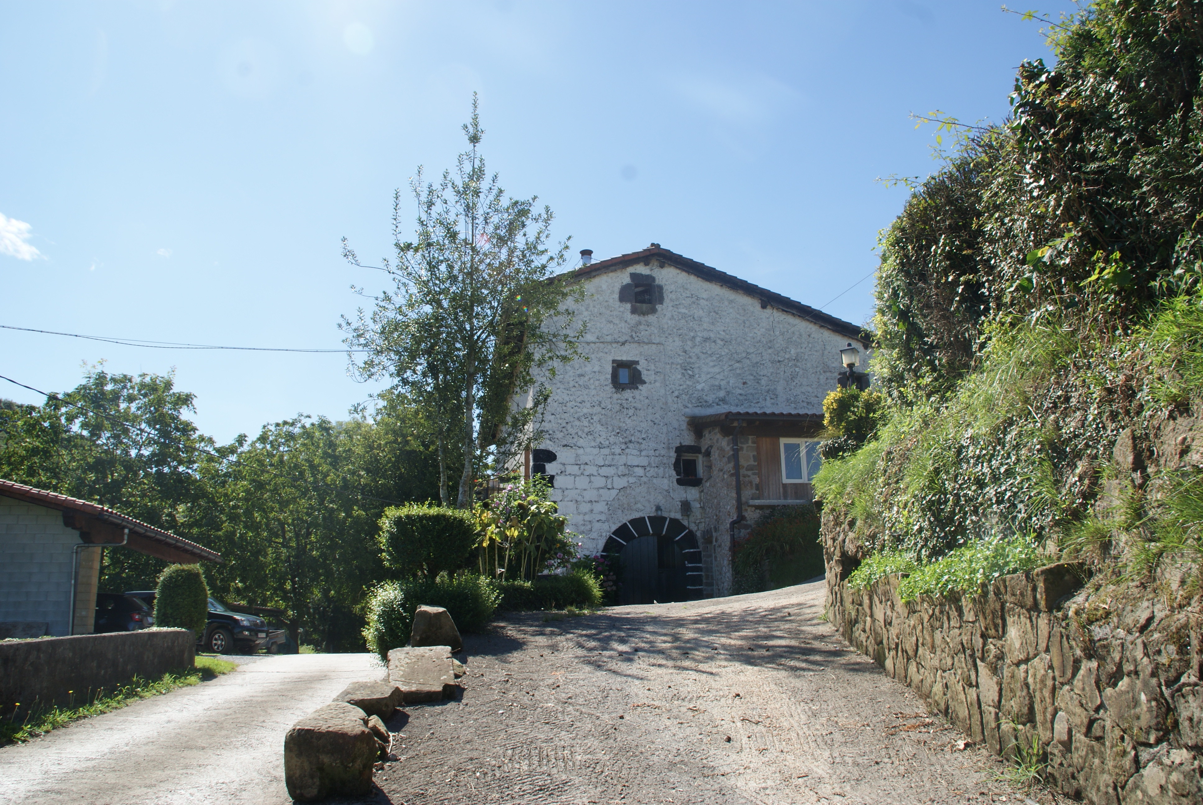 Garaño baserria, Oiartzun